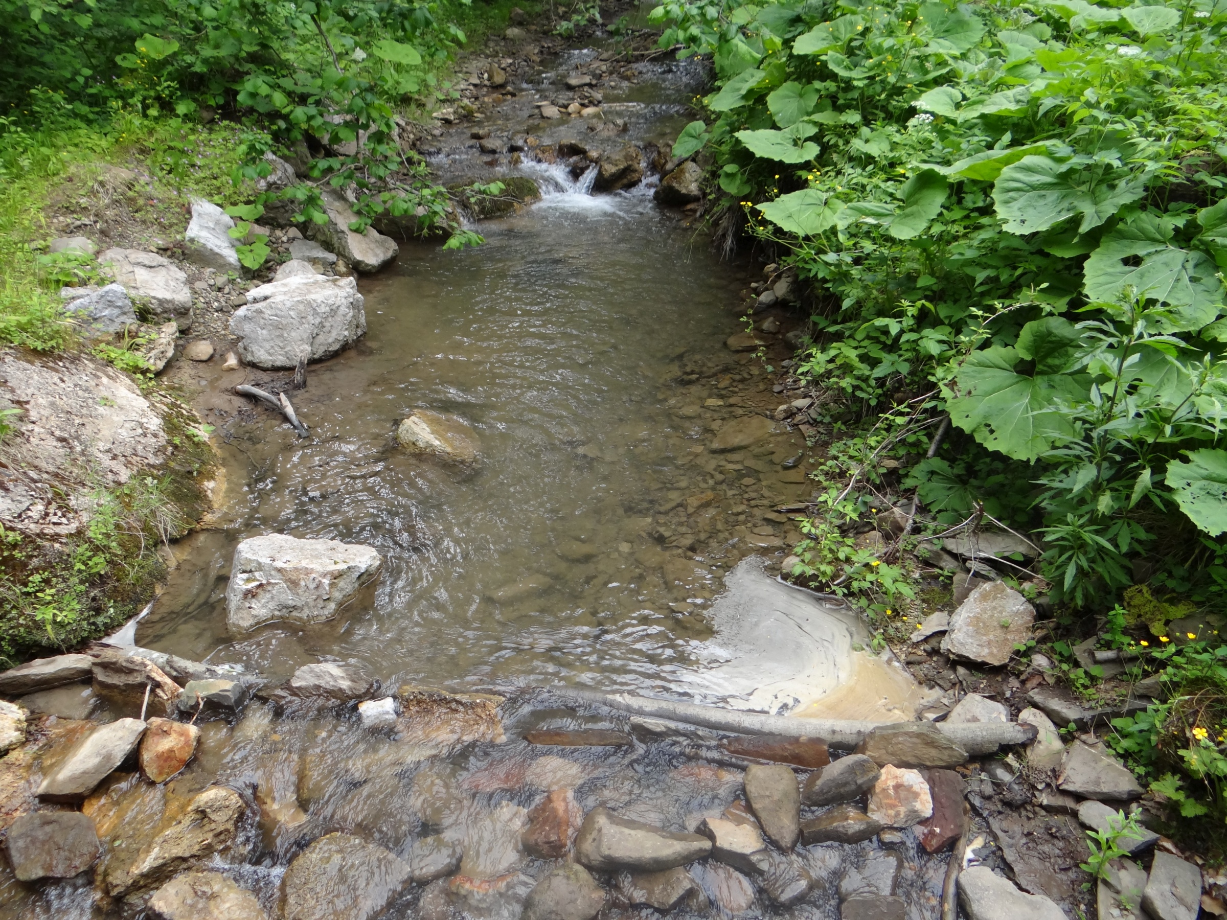 Zálažný potok